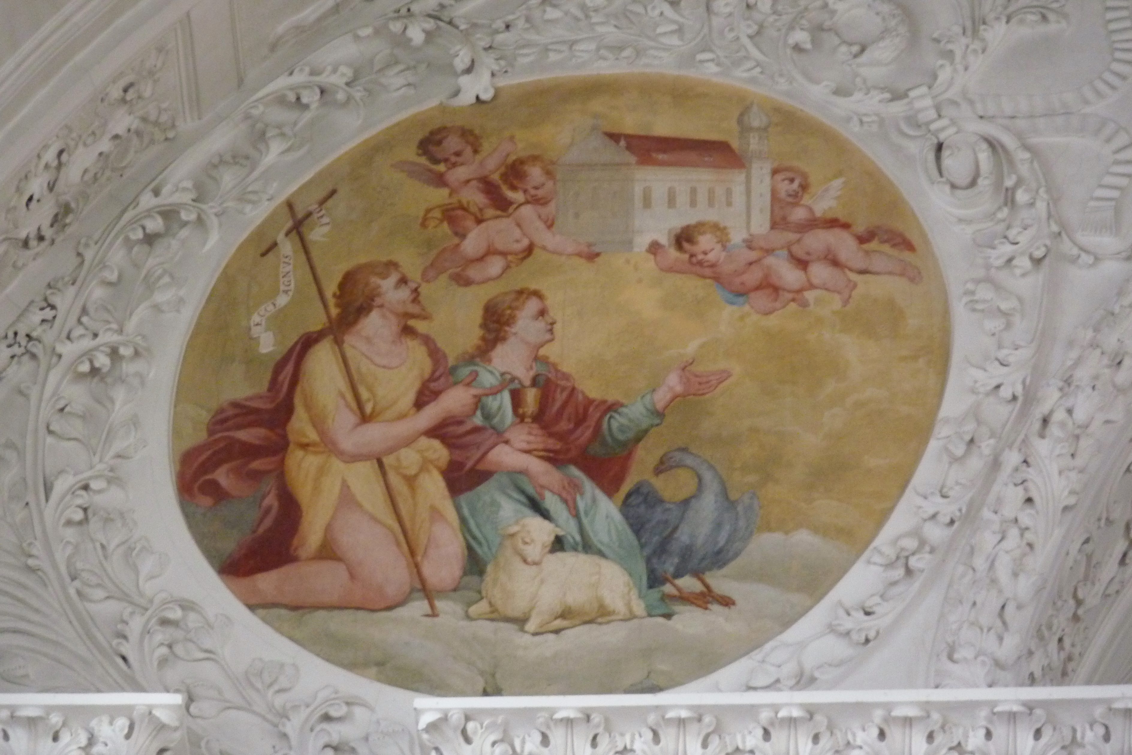 Ehemalige Damenstiftskirche, katholische Pfarrkirche St. Johannes Baptist und Johannes Evangelist in Edelstetten in der Gemeinde Neuburg an der Kammel im Landkreis Günzburg (Bayern), Stuck von Simpert Kraemer von 1710/1711, Freskenzyklus von Arbogast Thalheimer von 1710/11, Darstellung: Johannes der Täufer, Johannes der Evangelist (mit den Symbolen Adler und Kelch mit Schlange, dem Symbol des Apostels Johannes), im Hintergrund Kirchengebäude